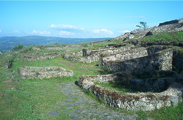 Vivendas de Castromao